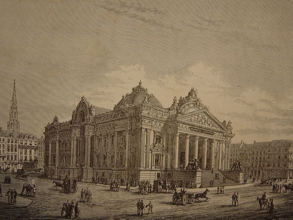 La nouvelle Bourse de Bruxelles par V.DeDoncker